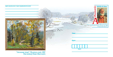 Конверт с оригинальной маркой «Живопись. П. В. Маслеников». Марка - Фрагмент (Живопись. «Портрет заслуженного деятеля искусств БССР, ветерана Великой Отечественной войны П. В. Масленикова». Холст, масло. 1988. В. С. Протасеня). Иллюстрация - репродукции картин П. В. Масленикова «Последние листья» (холст, масло, 1987), «Свислочь раскрывается» (картон, масло, 1992).